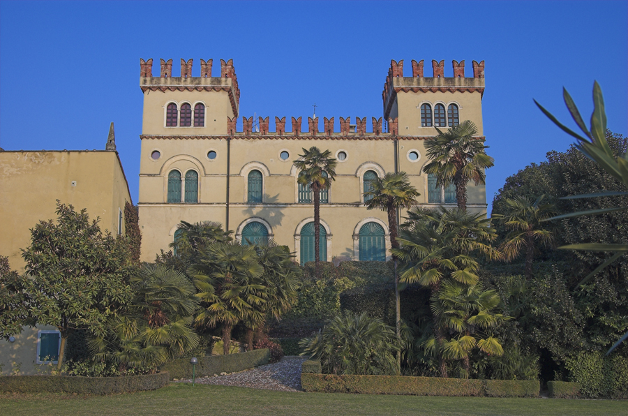 Villa Pergolana, situata presso il lungolago di Lazise